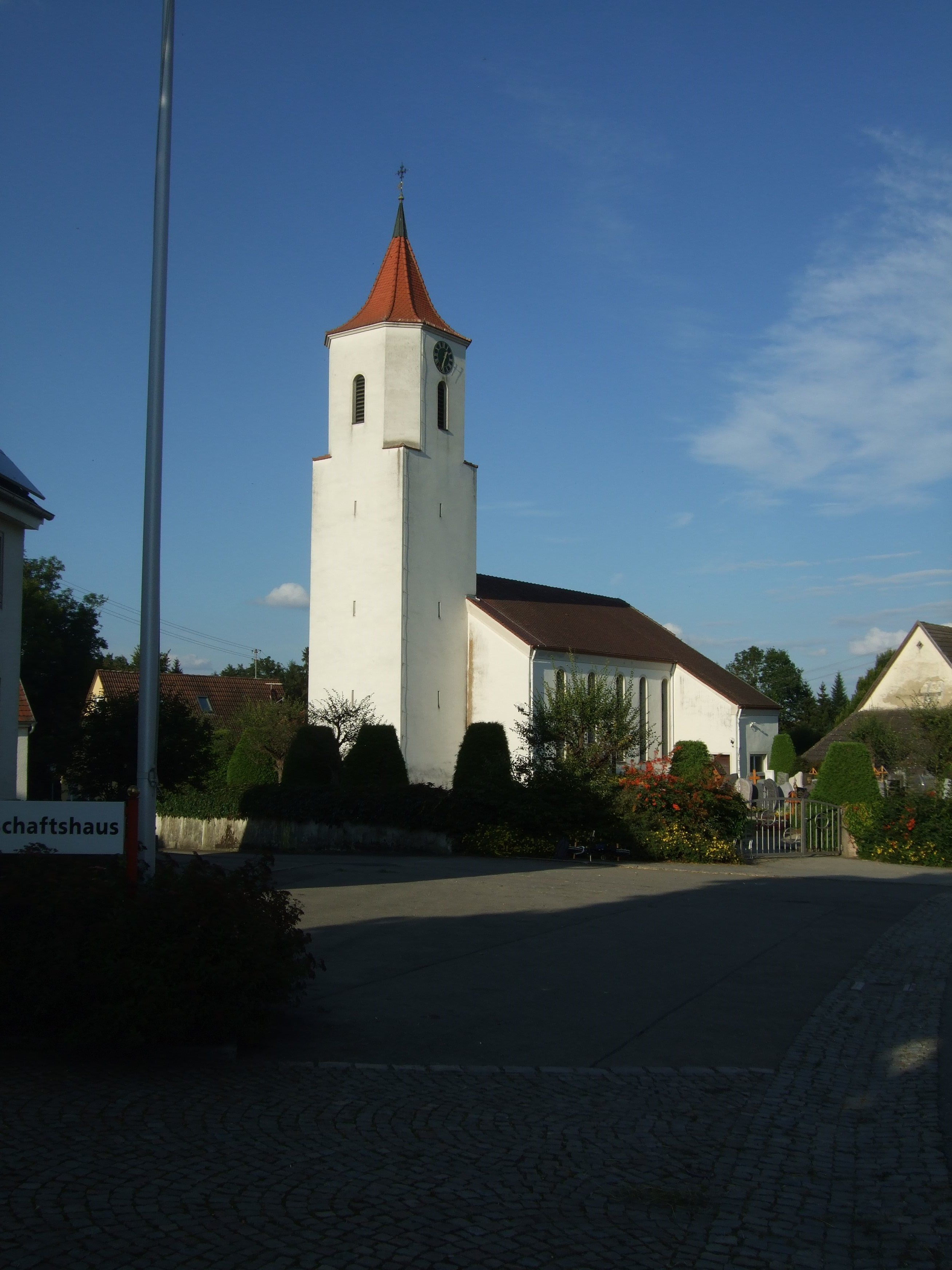 Die Kirche St. Bartholomäus in Erisdorf in der Gemeinde Ertingen-Erisdorf, Deutschland